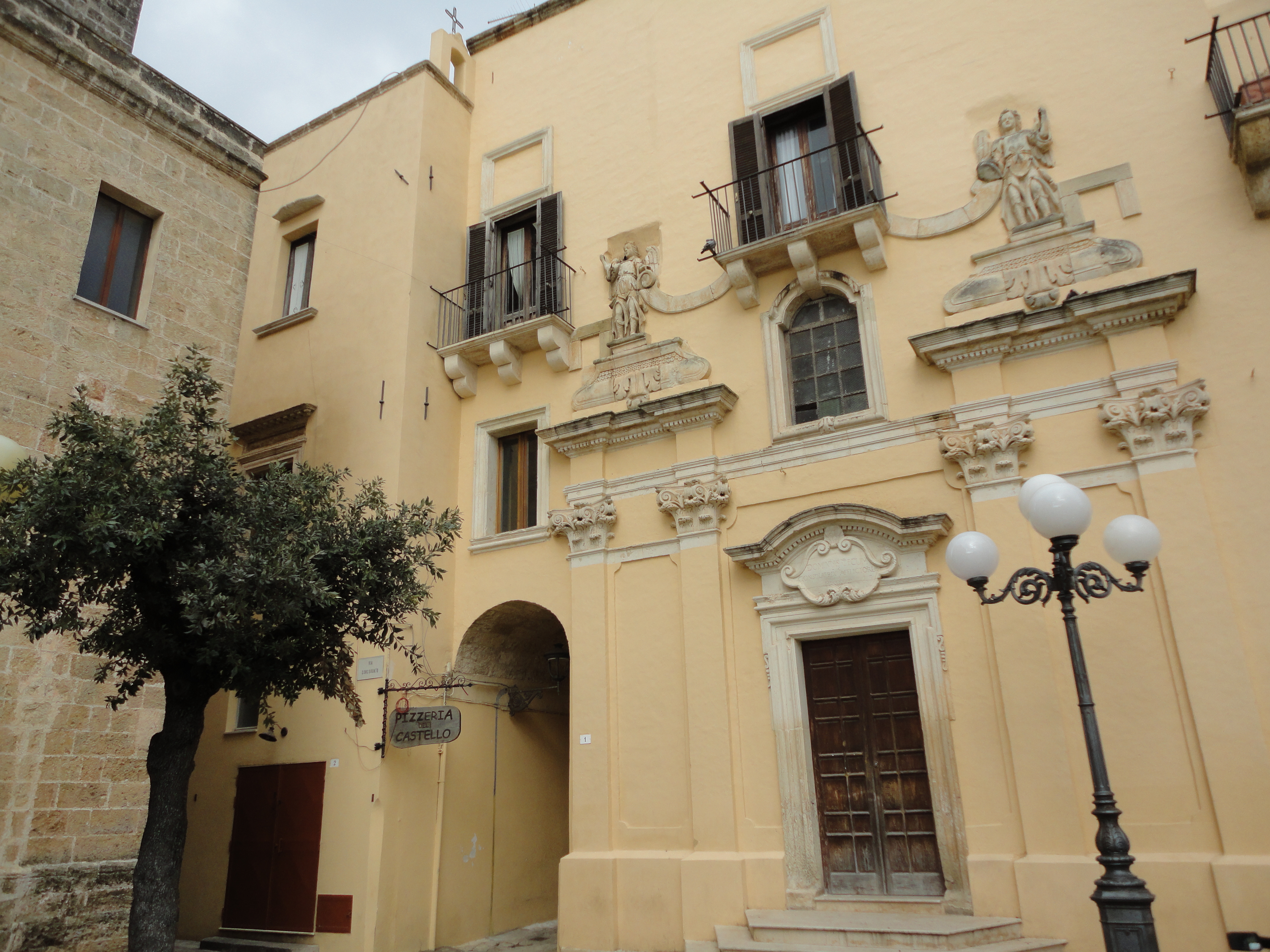 Chiesa San Nicola Taurisano, Lecce